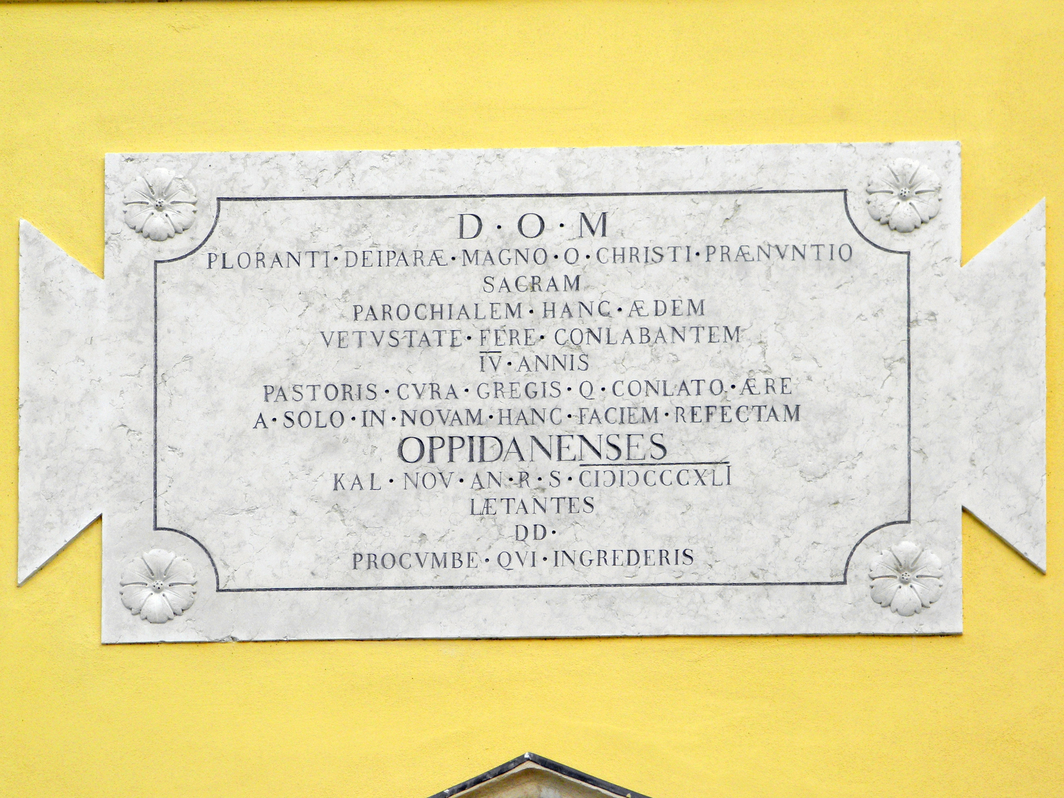 Oppeano, chiesa parrocchiale di Santa Maria Addolorata e San Giovanni Battista: dettaglio facciata.